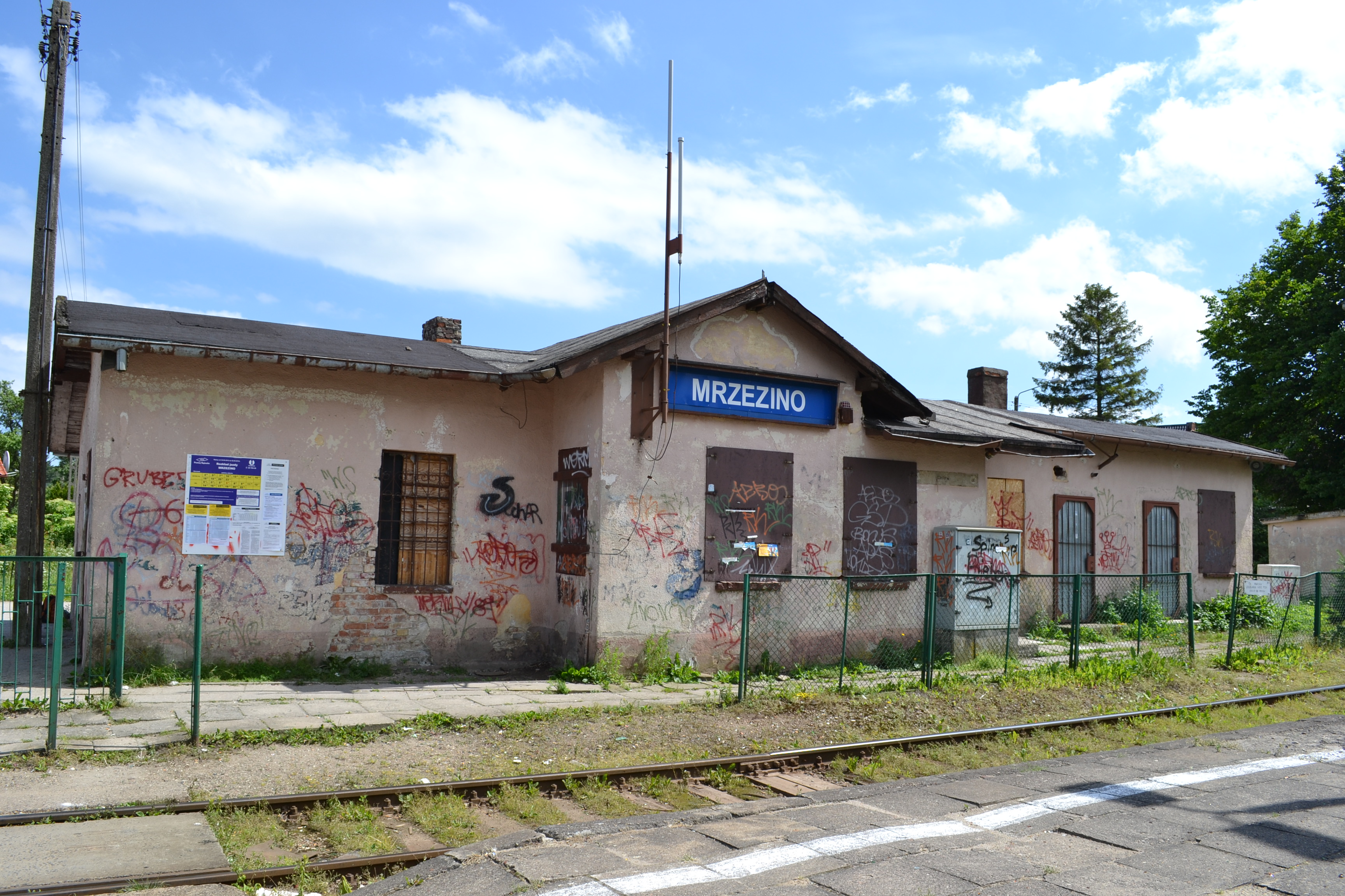 budynek przystanku w Mrzezinie